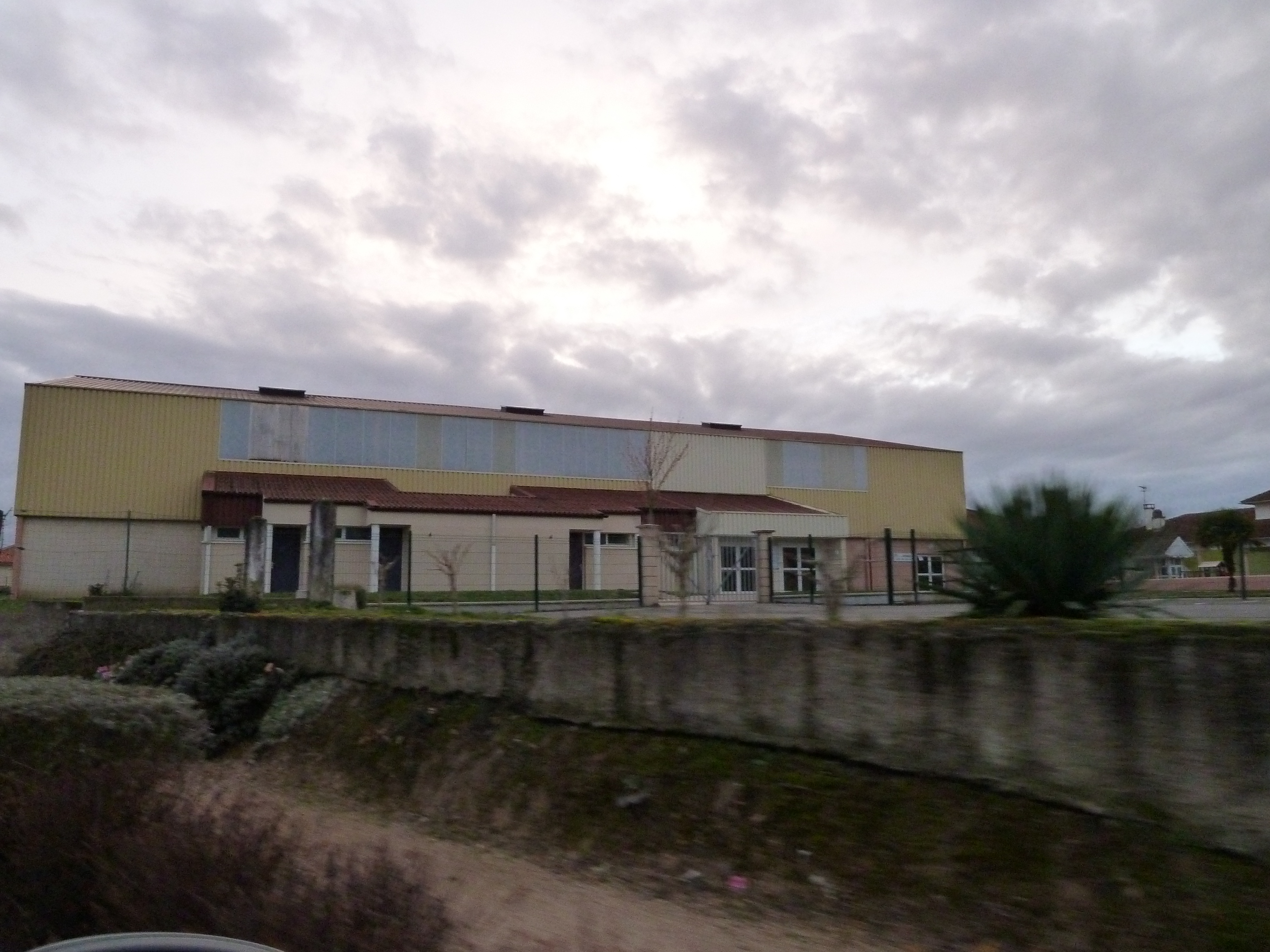 Salle polyvalente de Mazerolles (Pyrénées-Atlantiques)